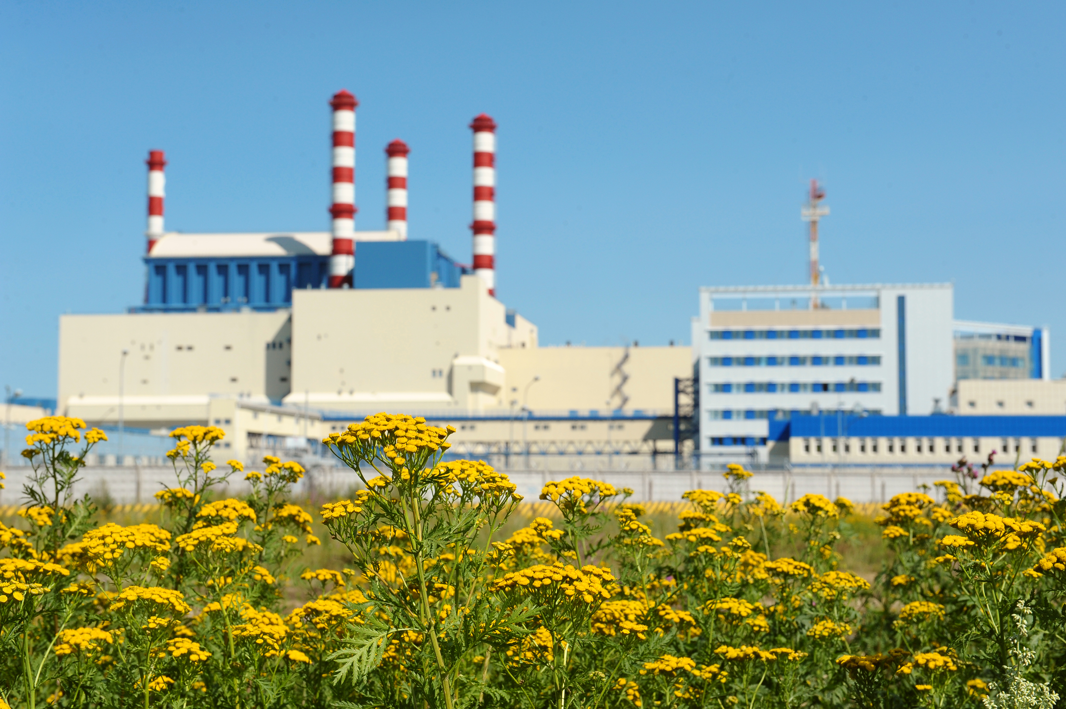 Экология БН-800